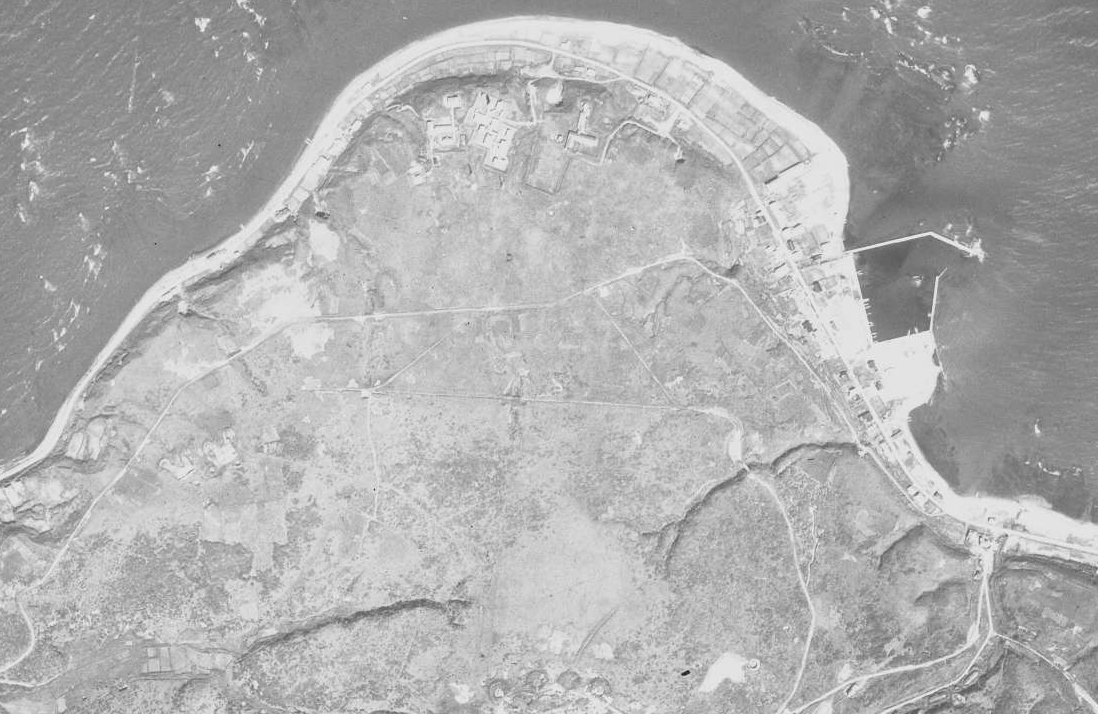 宗谷臨時要塞付近航空写真(1947年9月2日 米軍撮影)